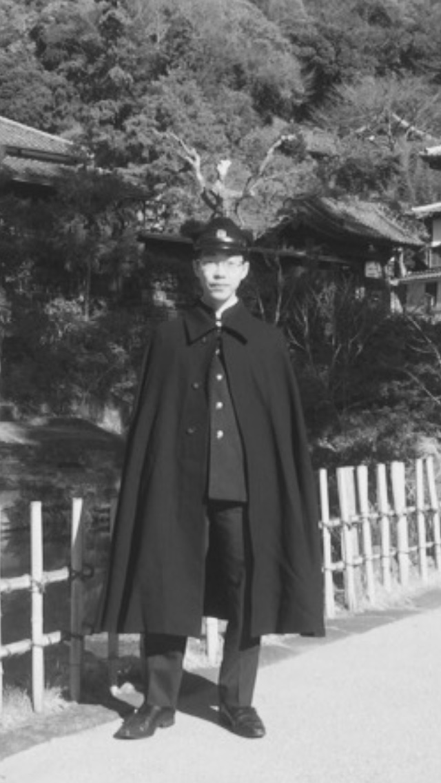 大正期の学生